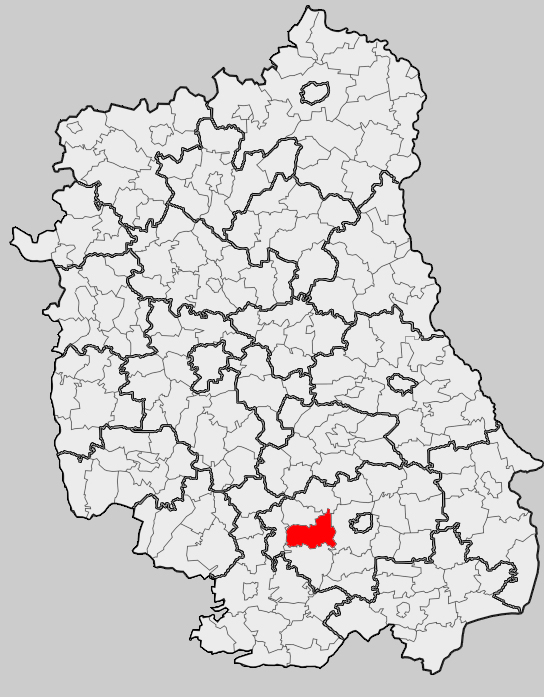 Map of gmina Szczebrzeszyn, Zamość county, Lublin voivodship Mapa gminy Szczebrzeszyn, powiat zamojski, województwo lubelskie